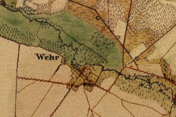 Preußische Kartenaufnahme 1846 - Uraufnahme